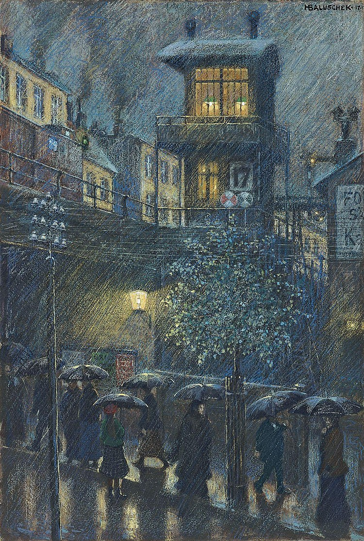 Rainlabel QS:Lde,"Regen"label QS:Len,"Rain"label QS:Lfr,"pluie"label QS:Lnl,"regen"label QS:Lpt,"chuva"